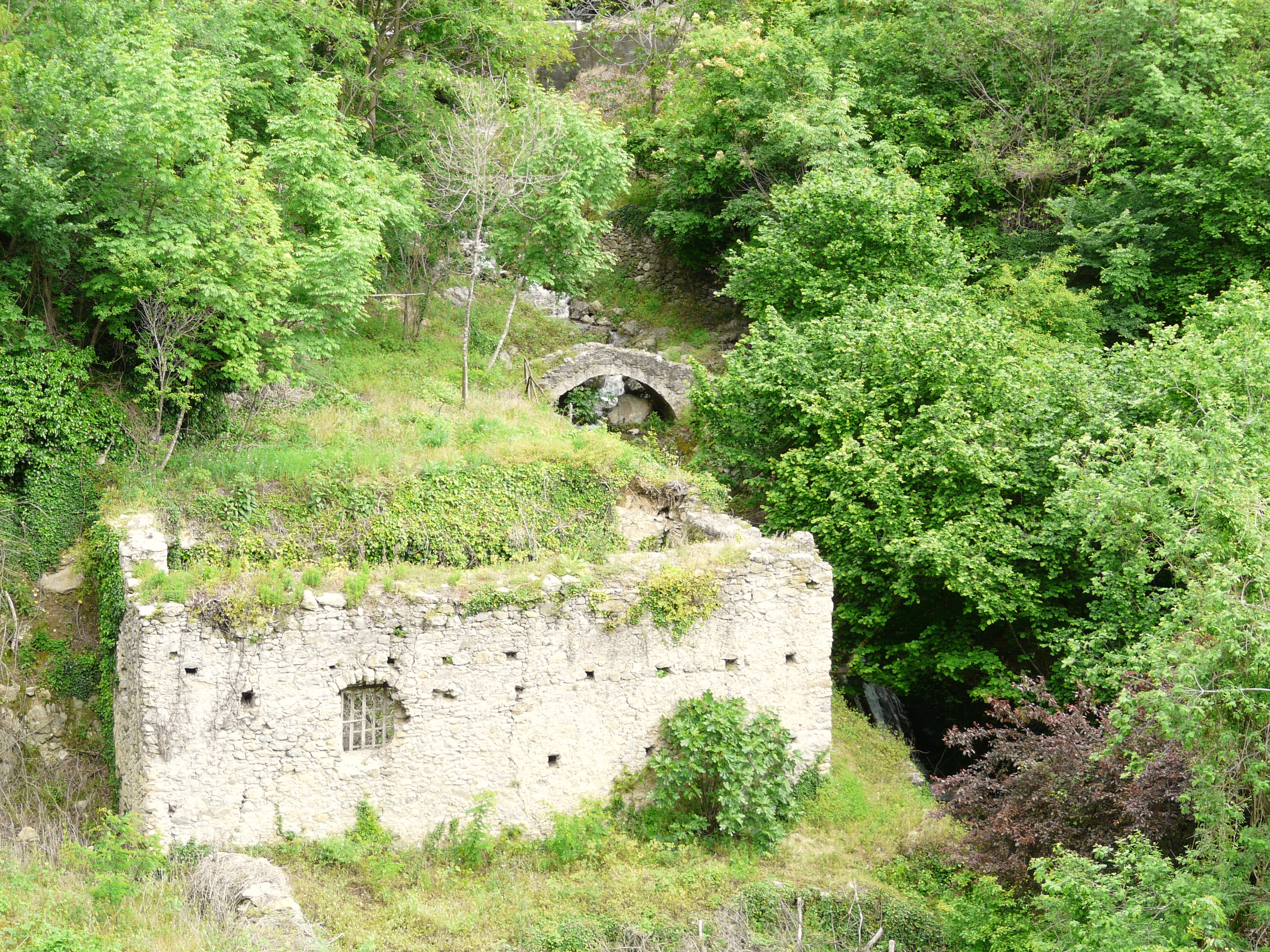 Antico ponte presso il Comune di Castelbianco, Liguria, Italia